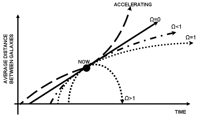 Gráfico de distancia entre galaxias en función del tiempo para diferentes tipos de Universo